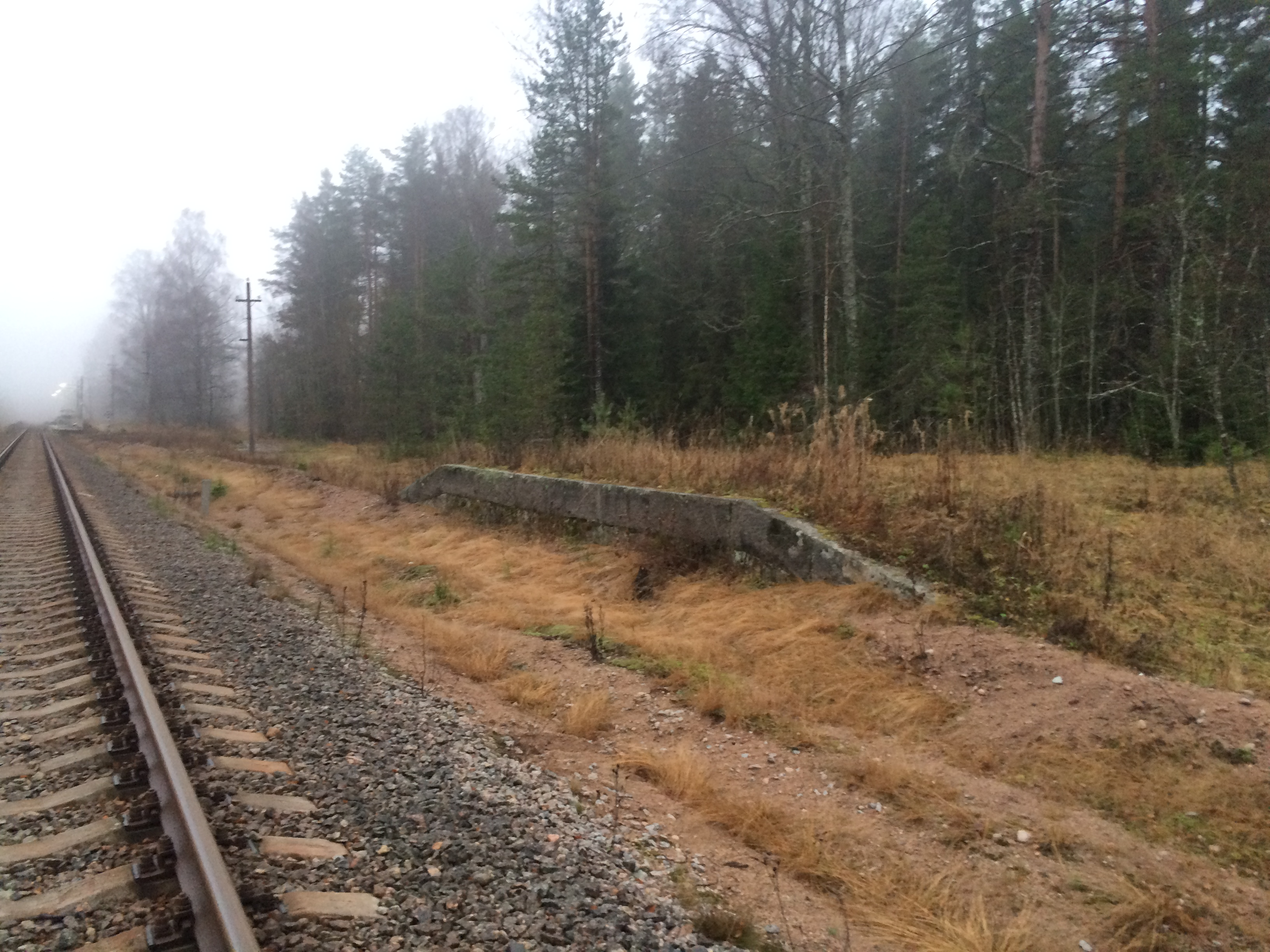 Тарасовское пл гр пл